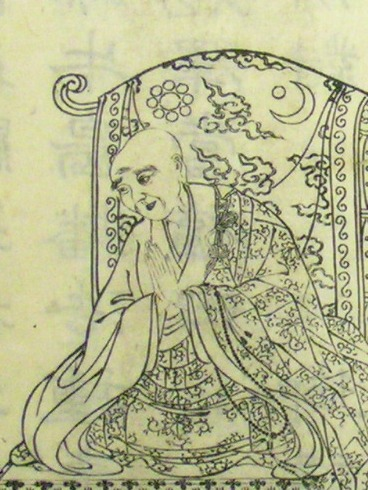 祐天（1637－1718） 江戸時代中期に活躍した浄土宗の高僧